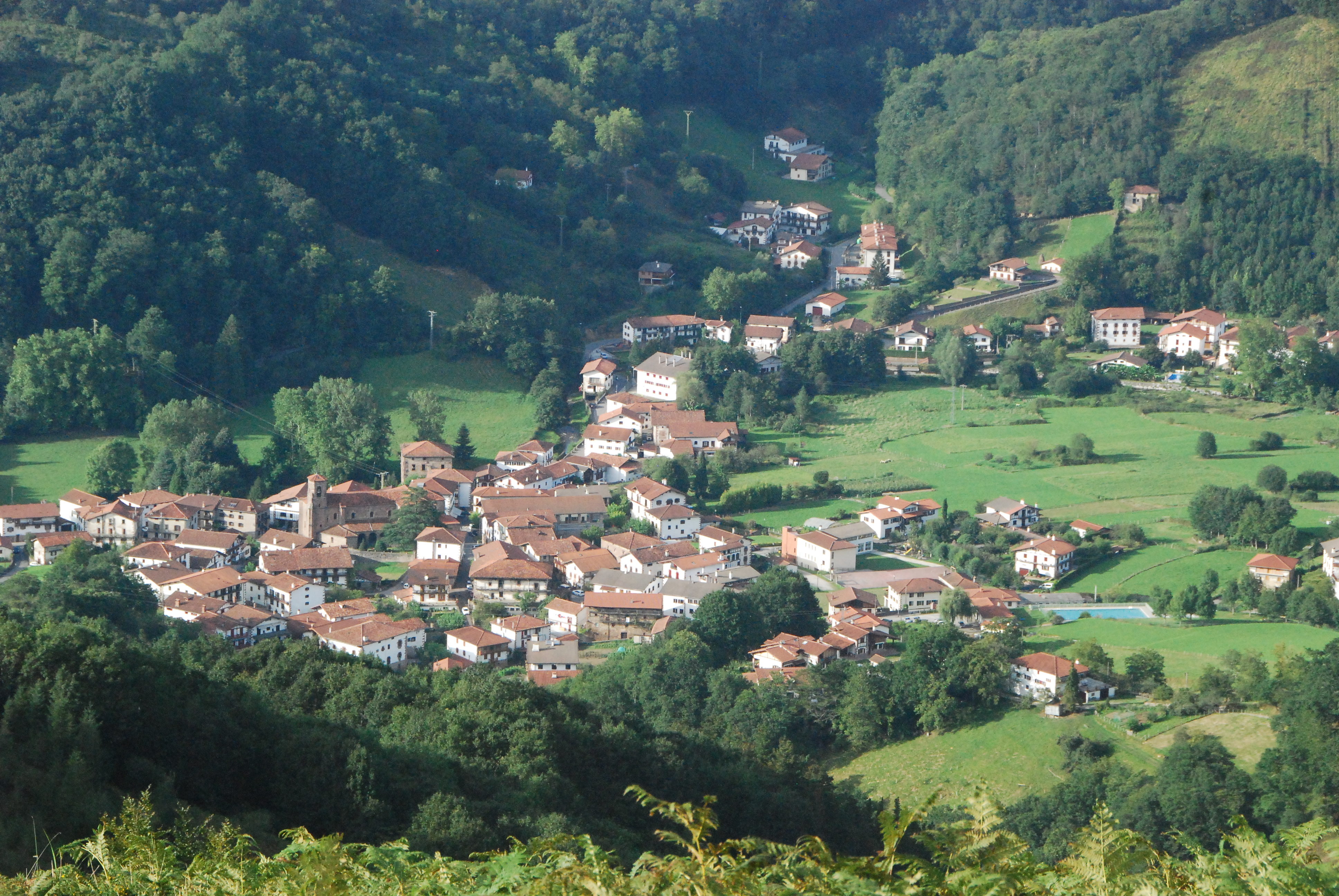 Etxalartik herria Azkua menditik